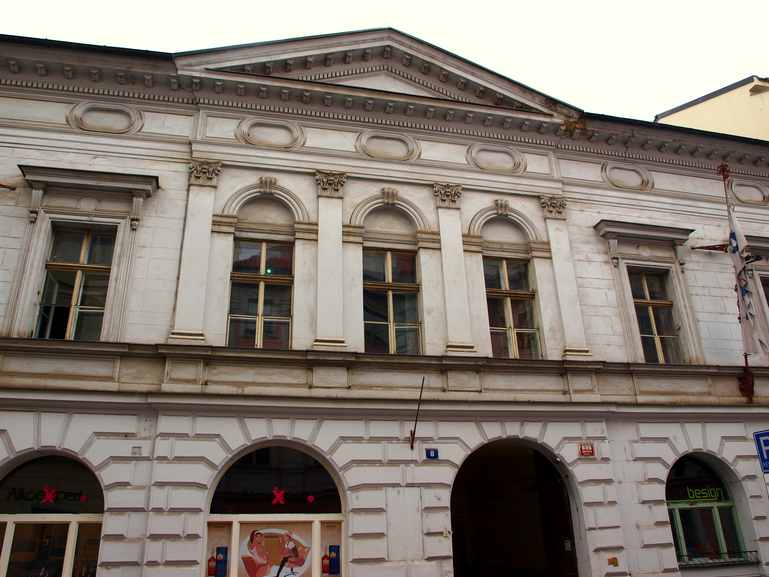 Millesimovský palác Panská 8